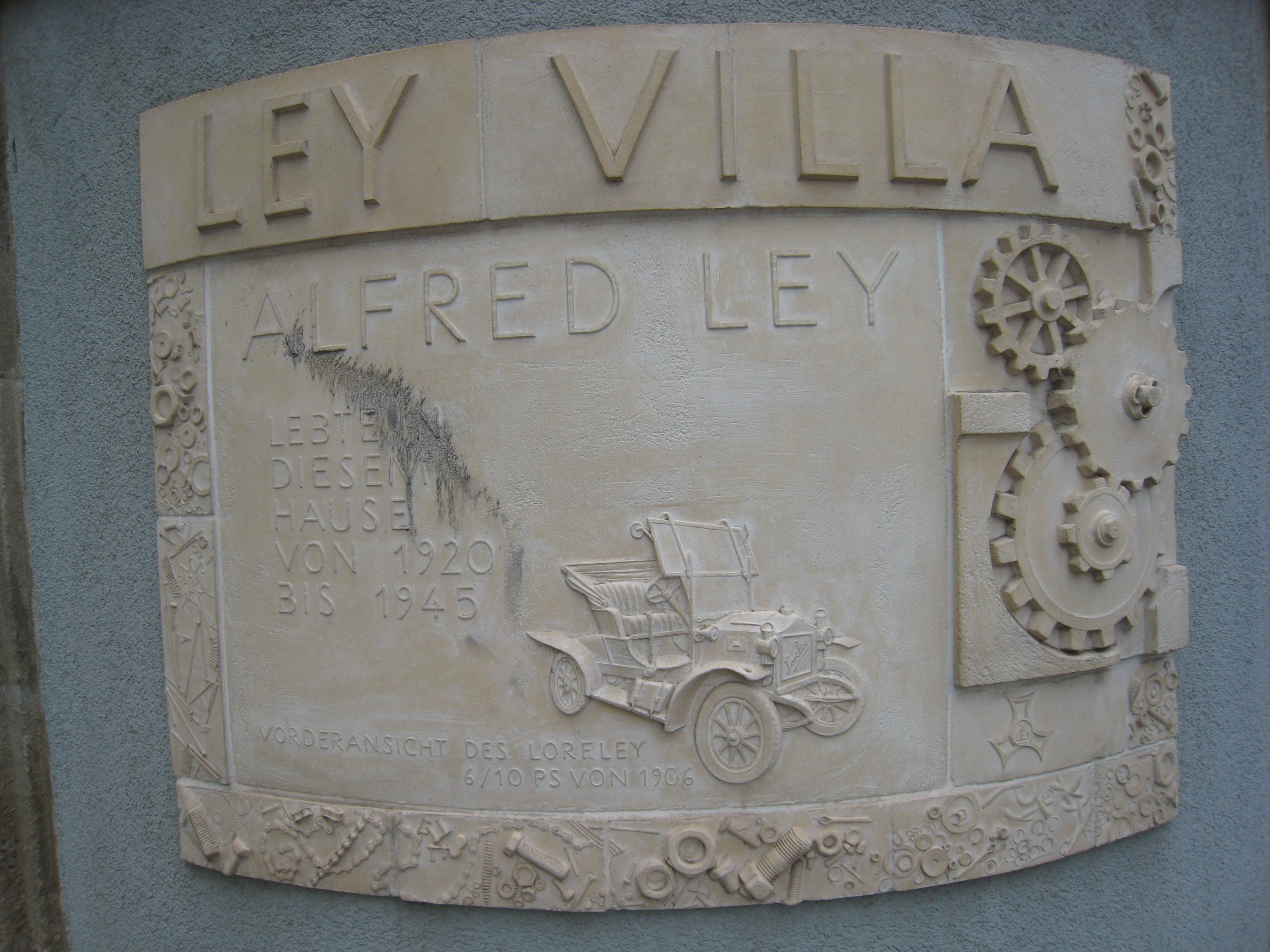 Enskribo ĉe la Vilao Ley en Arnstadt de apud Wollmarkt